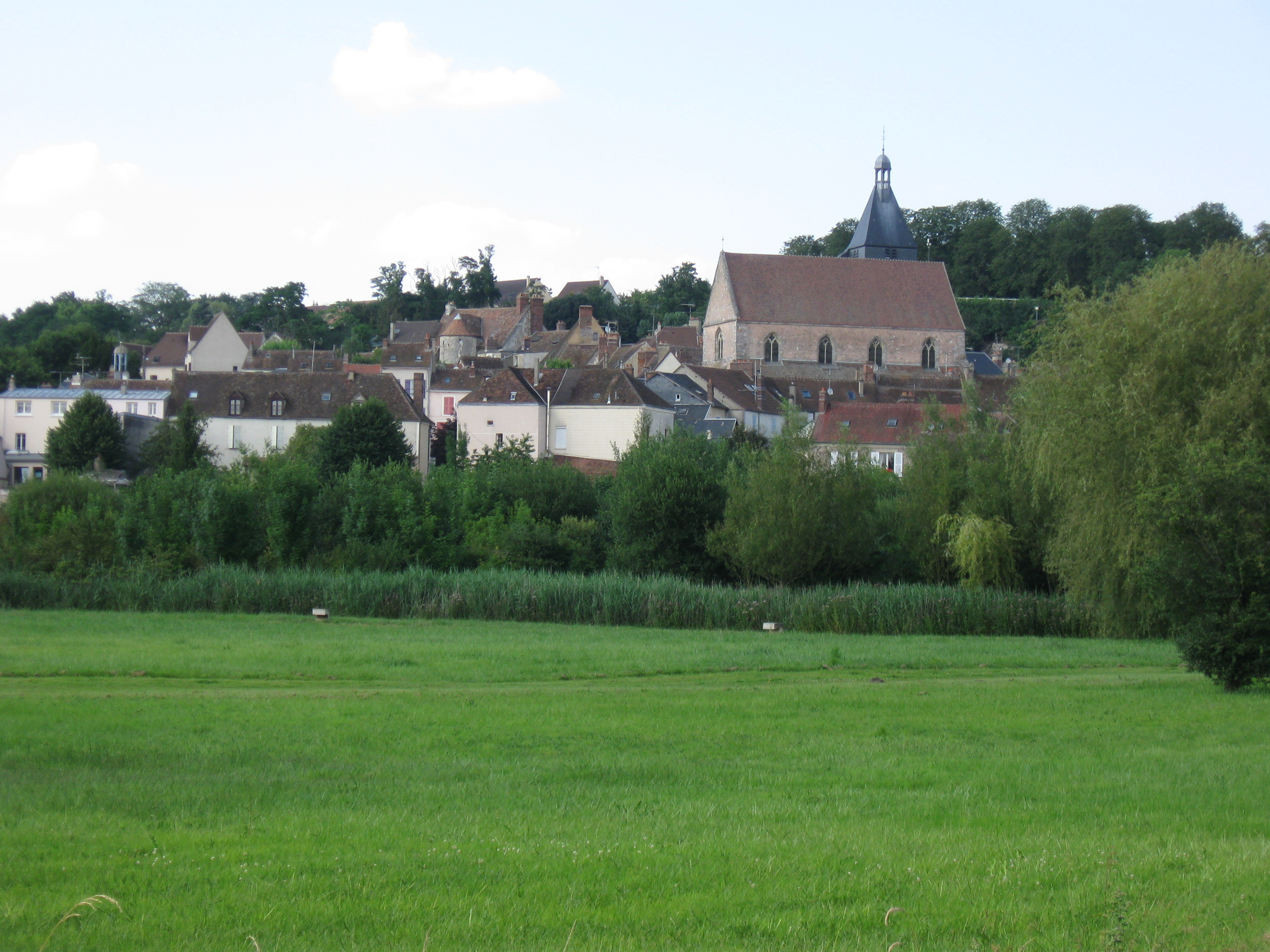 Épernon, vue de la Prairie. (Département d'Eure-et-Loir, région Centre).